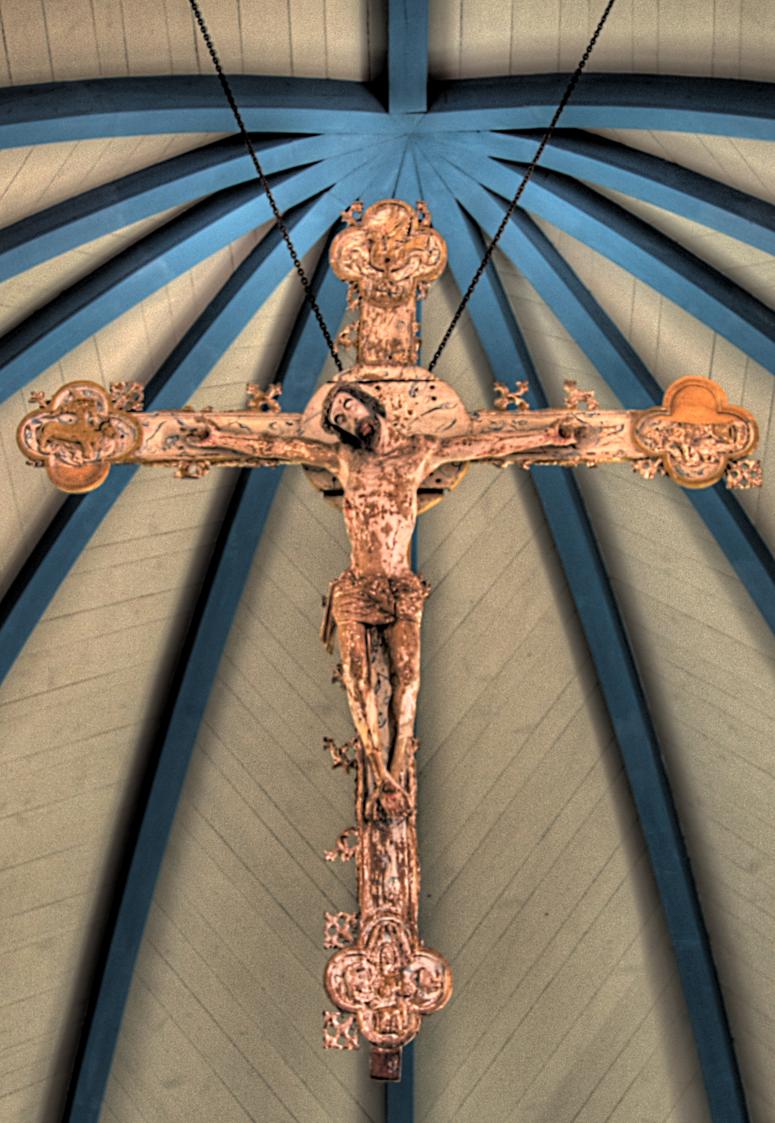 Triumfkrucifixet i Västra Vrams kyrka utanför Tollarp i Skåne.